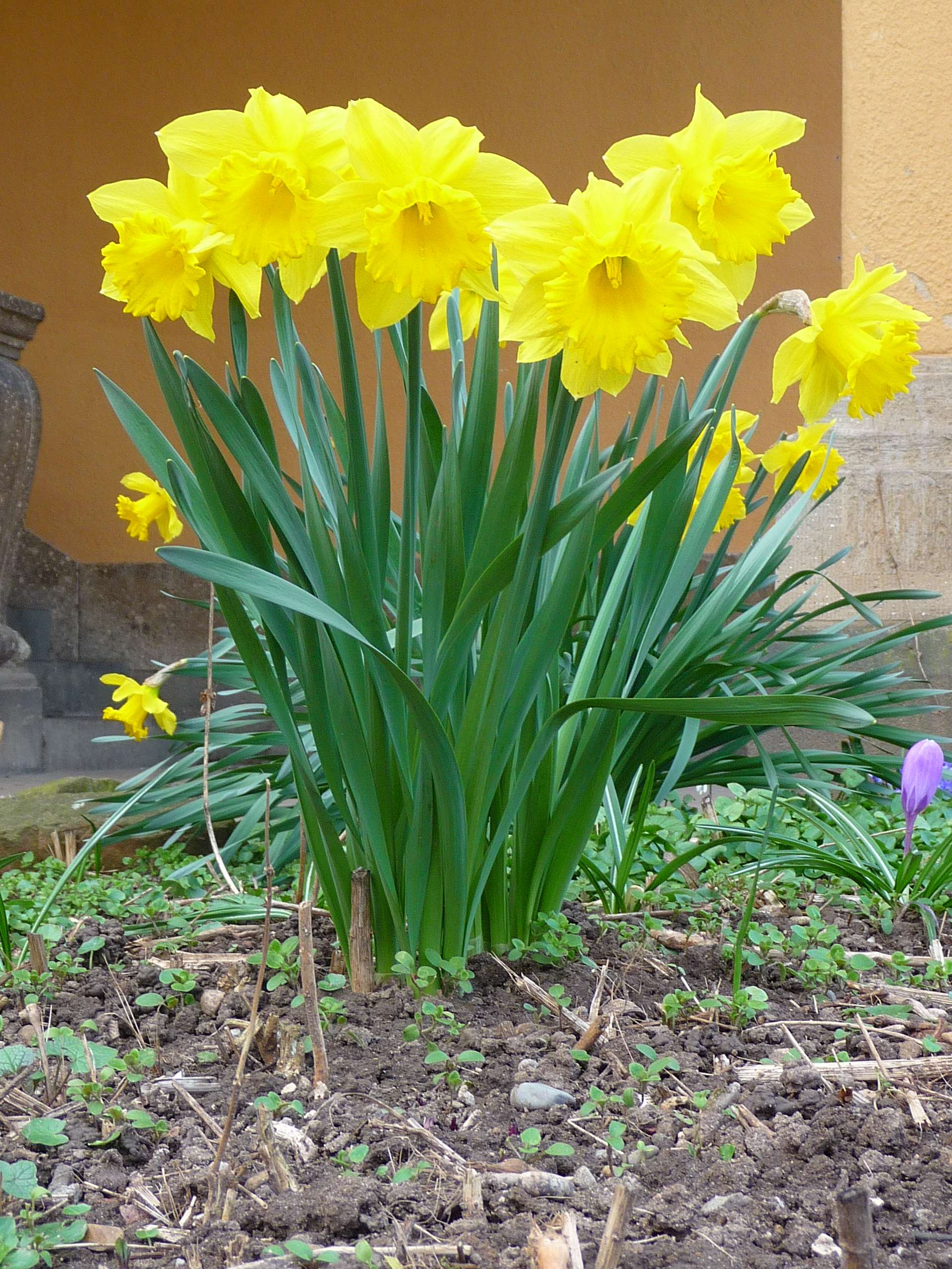 Gelbe Narzissen